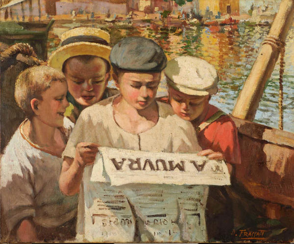 Quatre jeunes pêcheurs du port d’Ajaccio